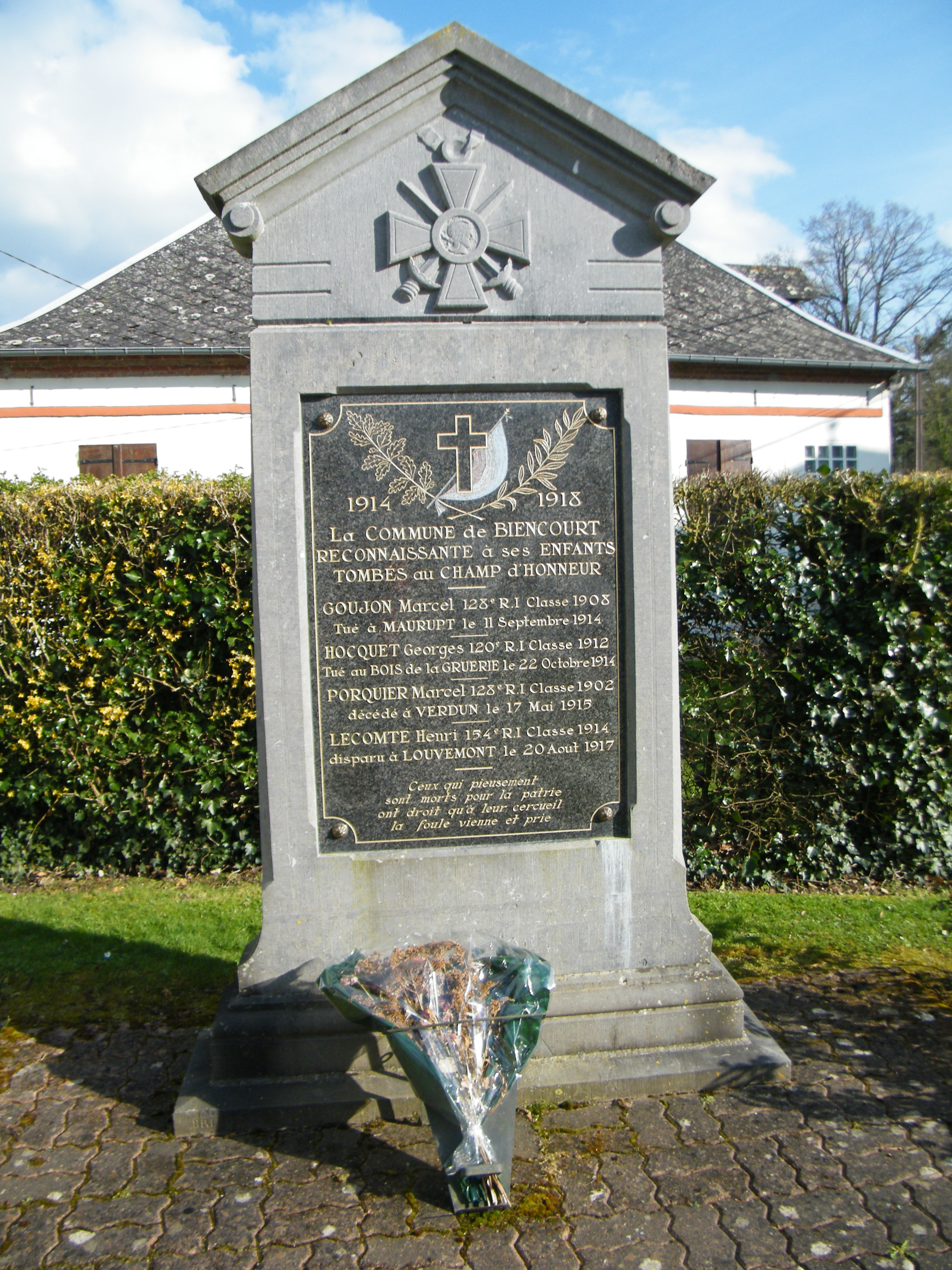 Monument aux morts pour la patrie.